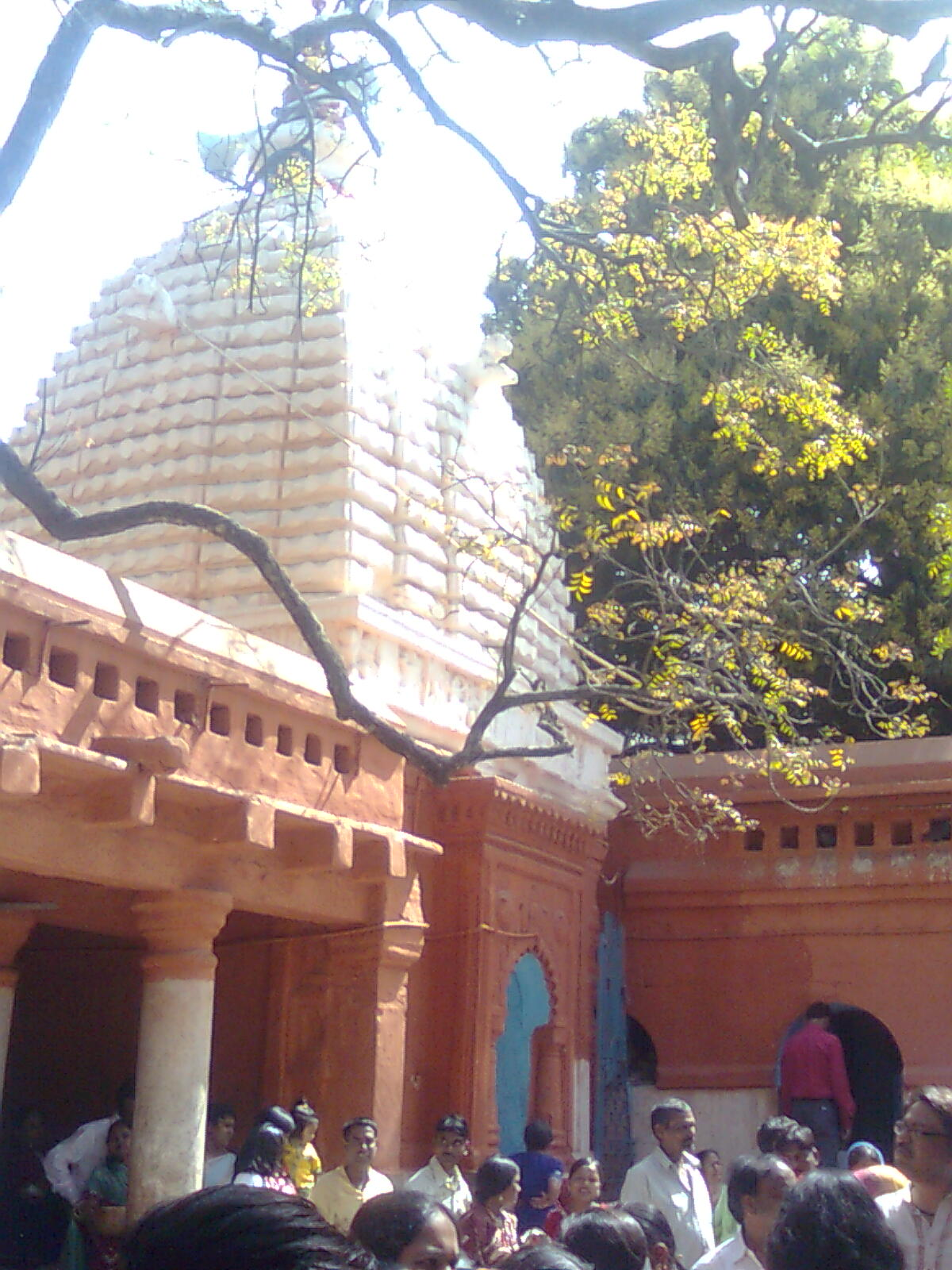 मैथन